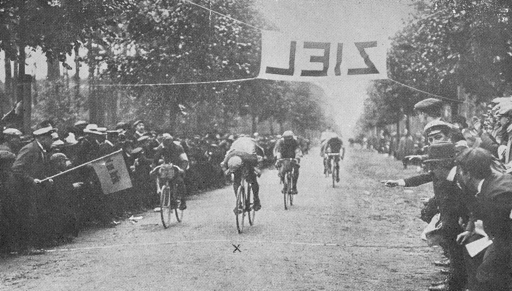 Rund um Berlin 1912, finaler Spurt